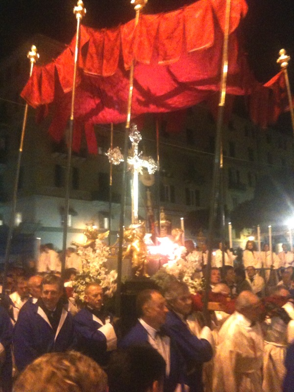 Reliquiario della Vera Croce per la processione del Venerdì Santo di Savona (Italy)